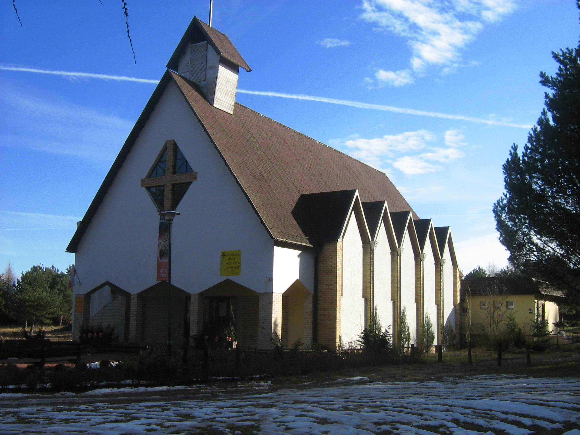 Wisełka, ul. Nowowiejska 47 - rzymskokatolicki kościół parafialny p.w. św, Józefa Opiekuna Rodzin.